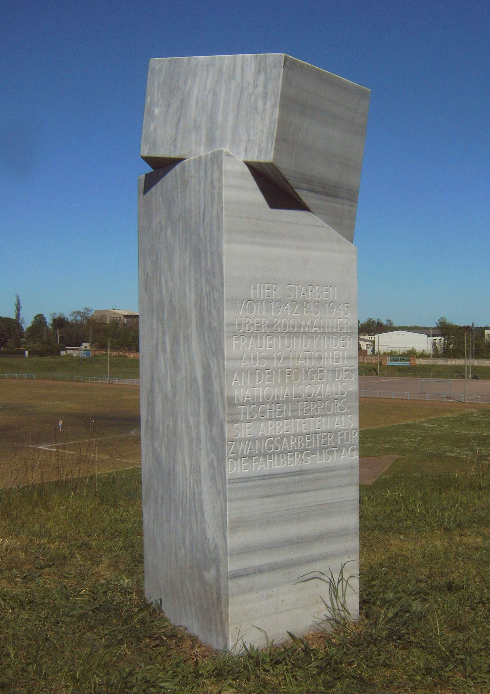 Mahnmal für Zwangsarbeiterlager Diana